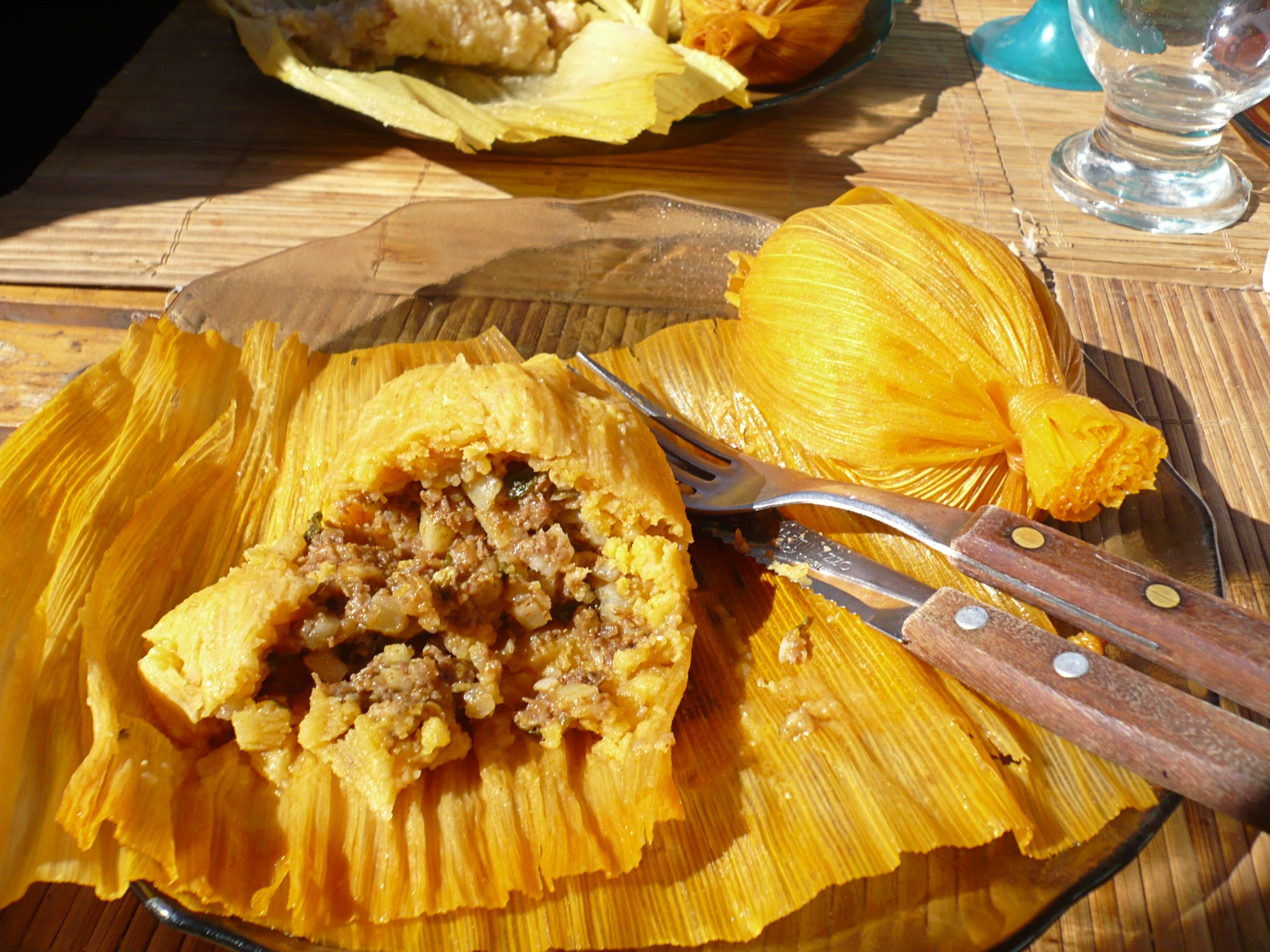 Tamales